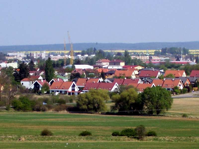 Praha, Uhříněves / Prague, Uhříněves